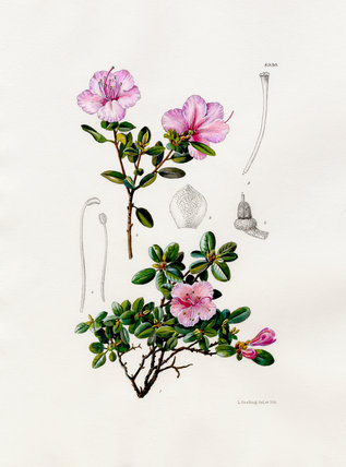 Рододендрон ЛедебураLatina: Rhododendron ledebourii